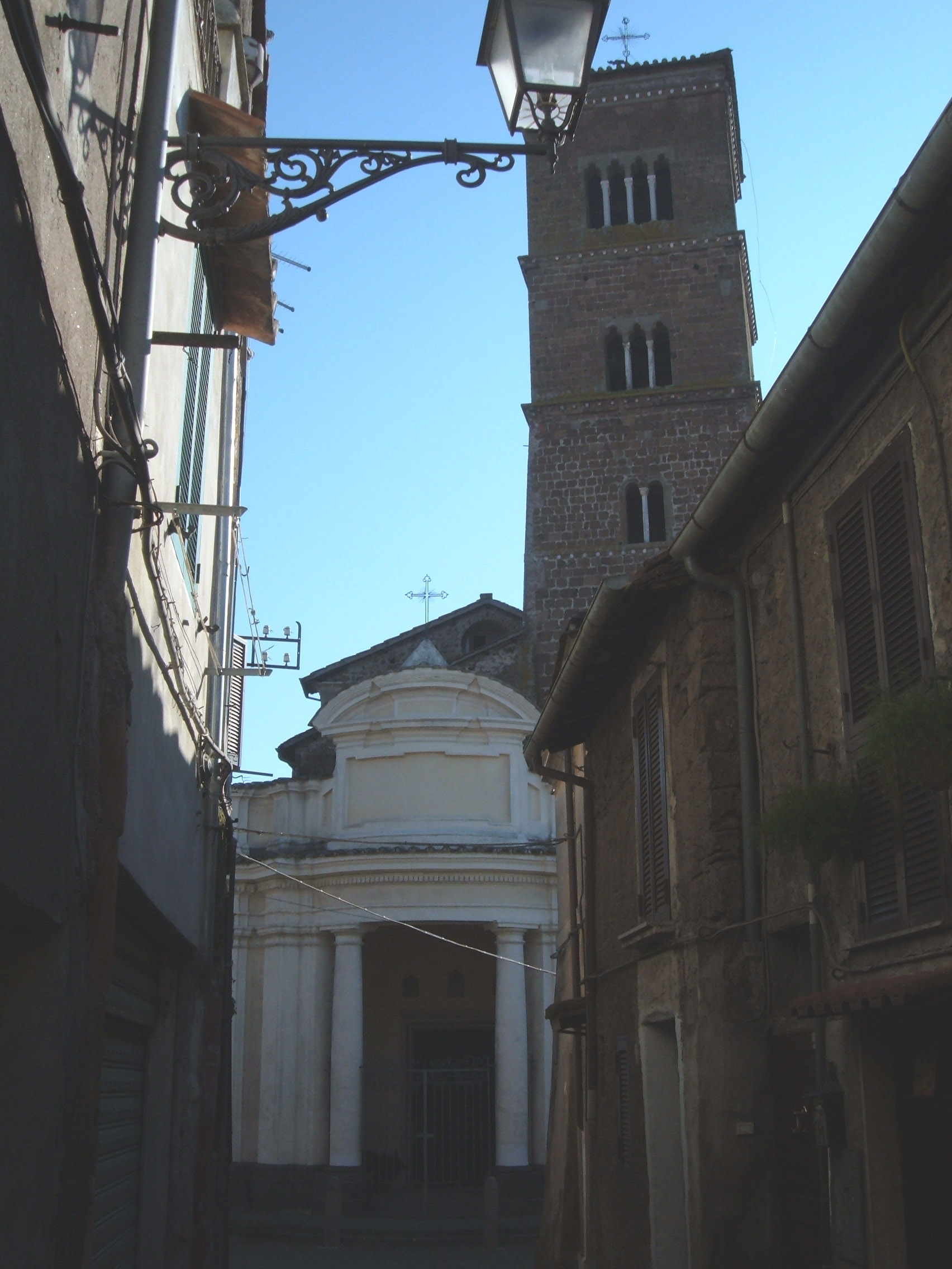 Cattedrale di Santa Maria Assunta, a Sutri, in provincia di Viterbo.